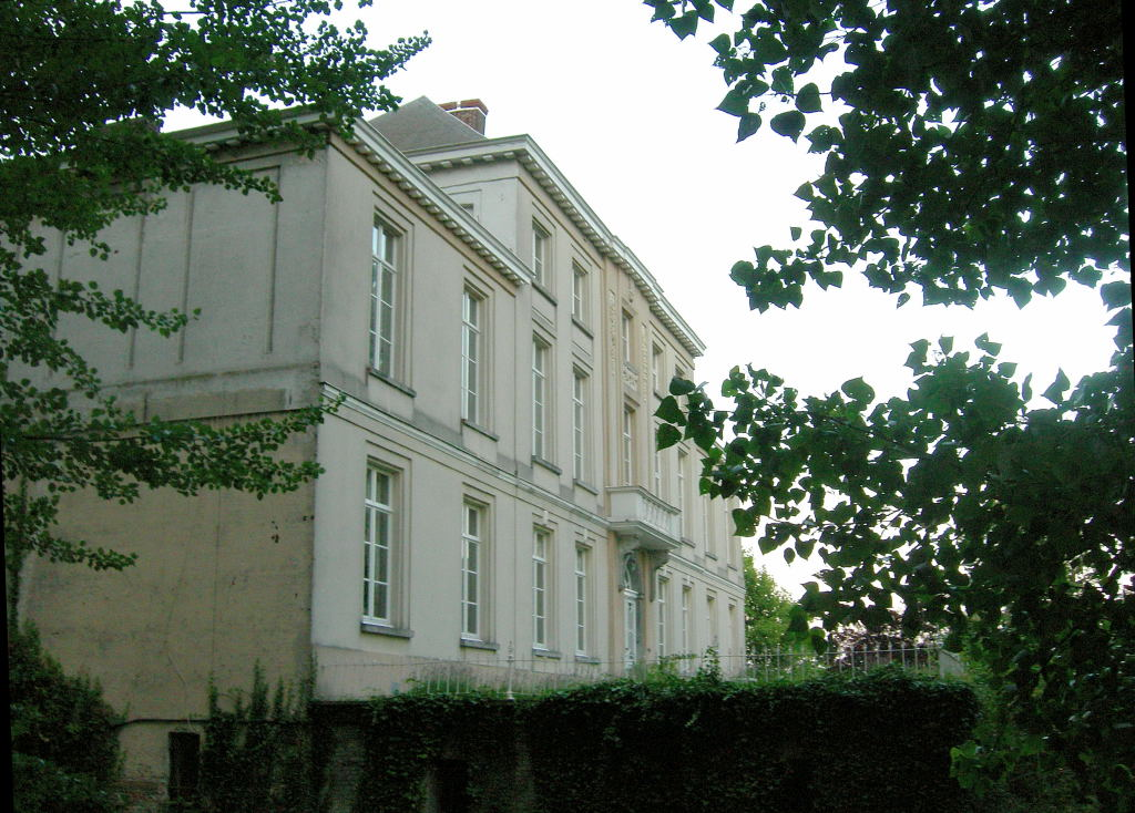 Kasteel van Wakken, bij valavond (vanuit NW)